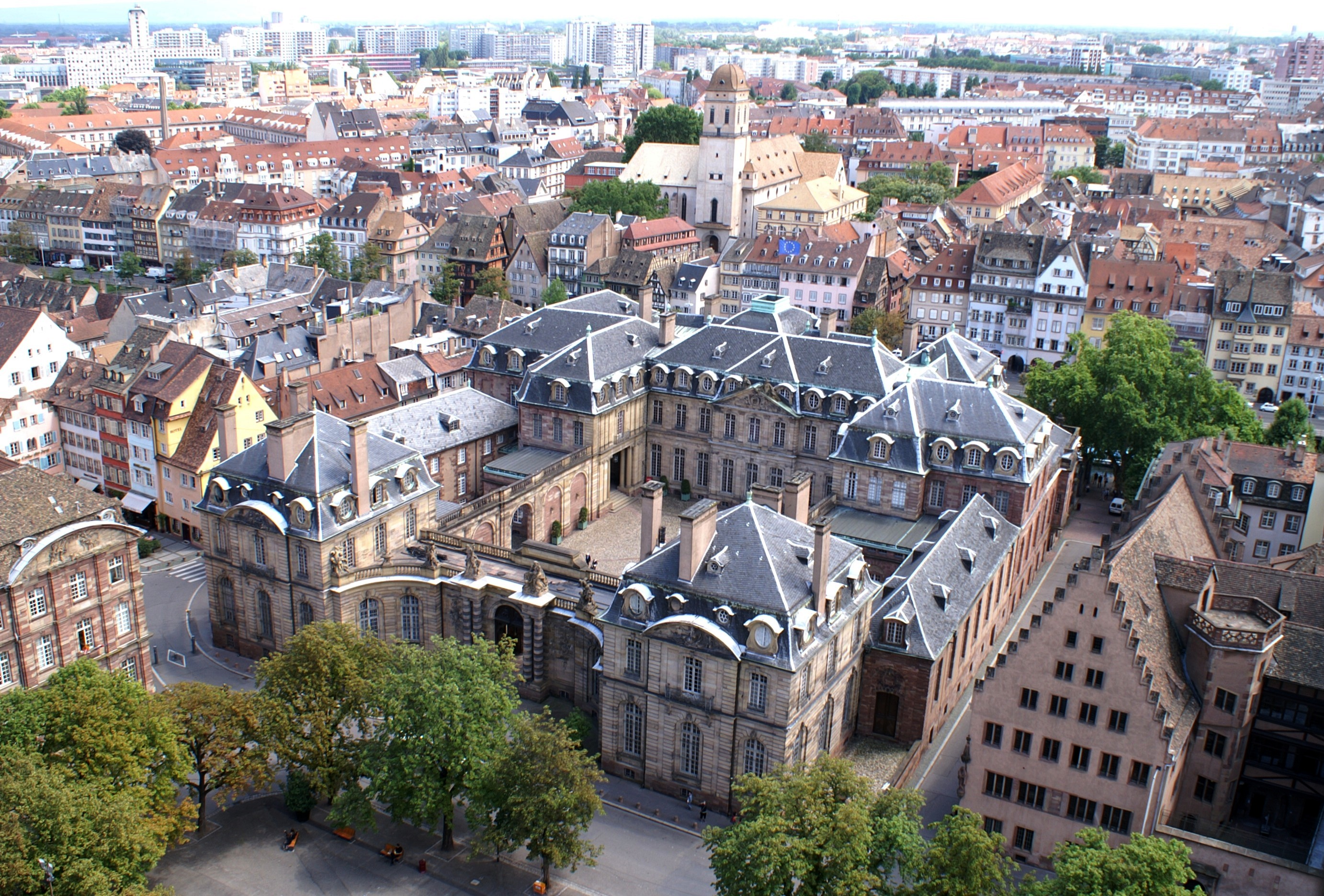 Alsace, Bas-Rhin, Strasbourg, Palais Rohan (Résidence du Prince-Évêque de Strasbourg au XVIIIe), puis musées, 2 place du Château.